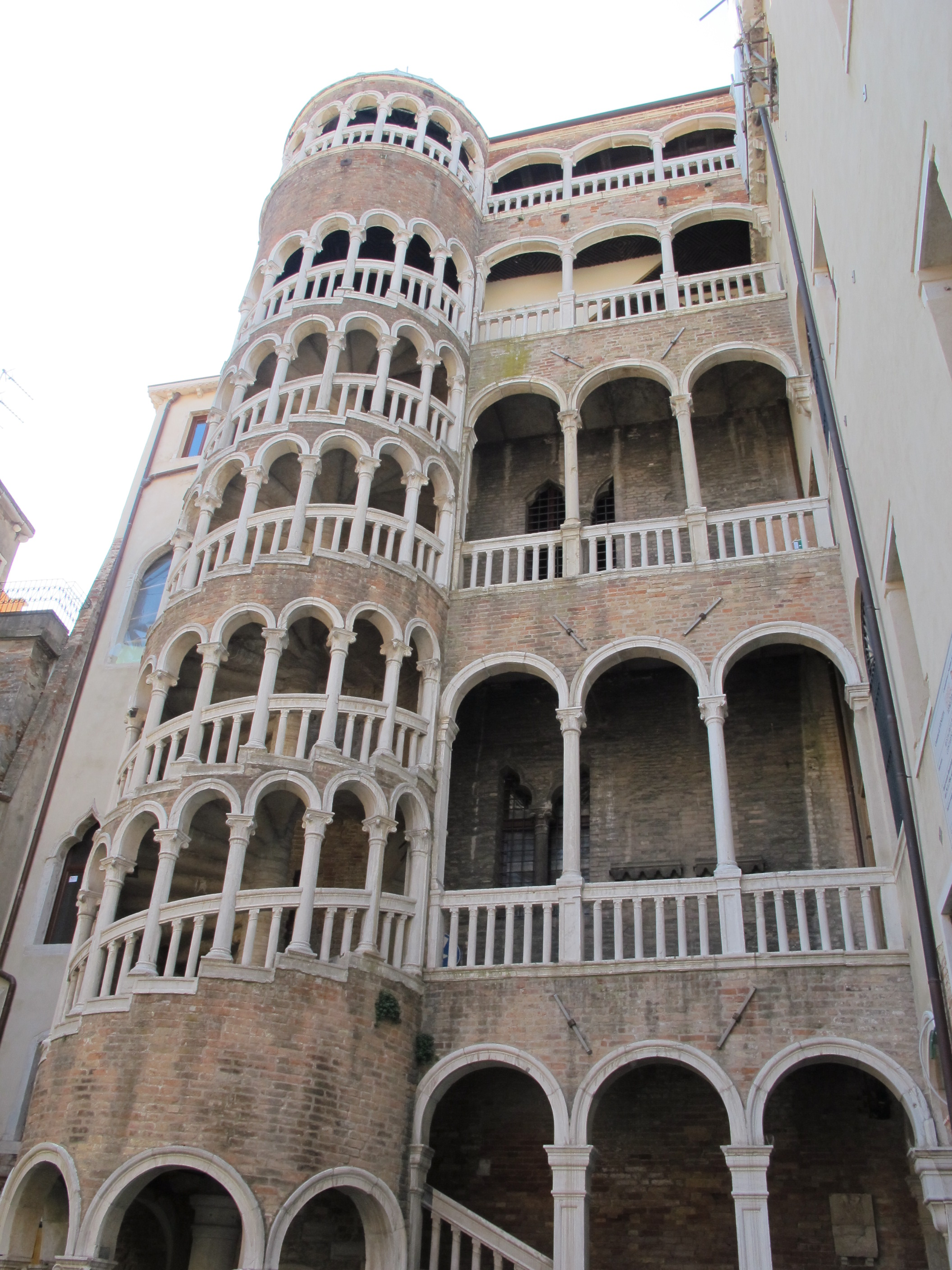 Palazzo contarini del bovolo